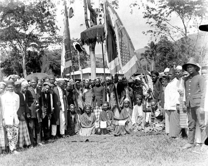 Negatief. Sum. W.K. Kerintji. Tentoonstelling van piagems, oorkonden in rentjongschrift op de aloon-aloon te Soengaipenoeh.